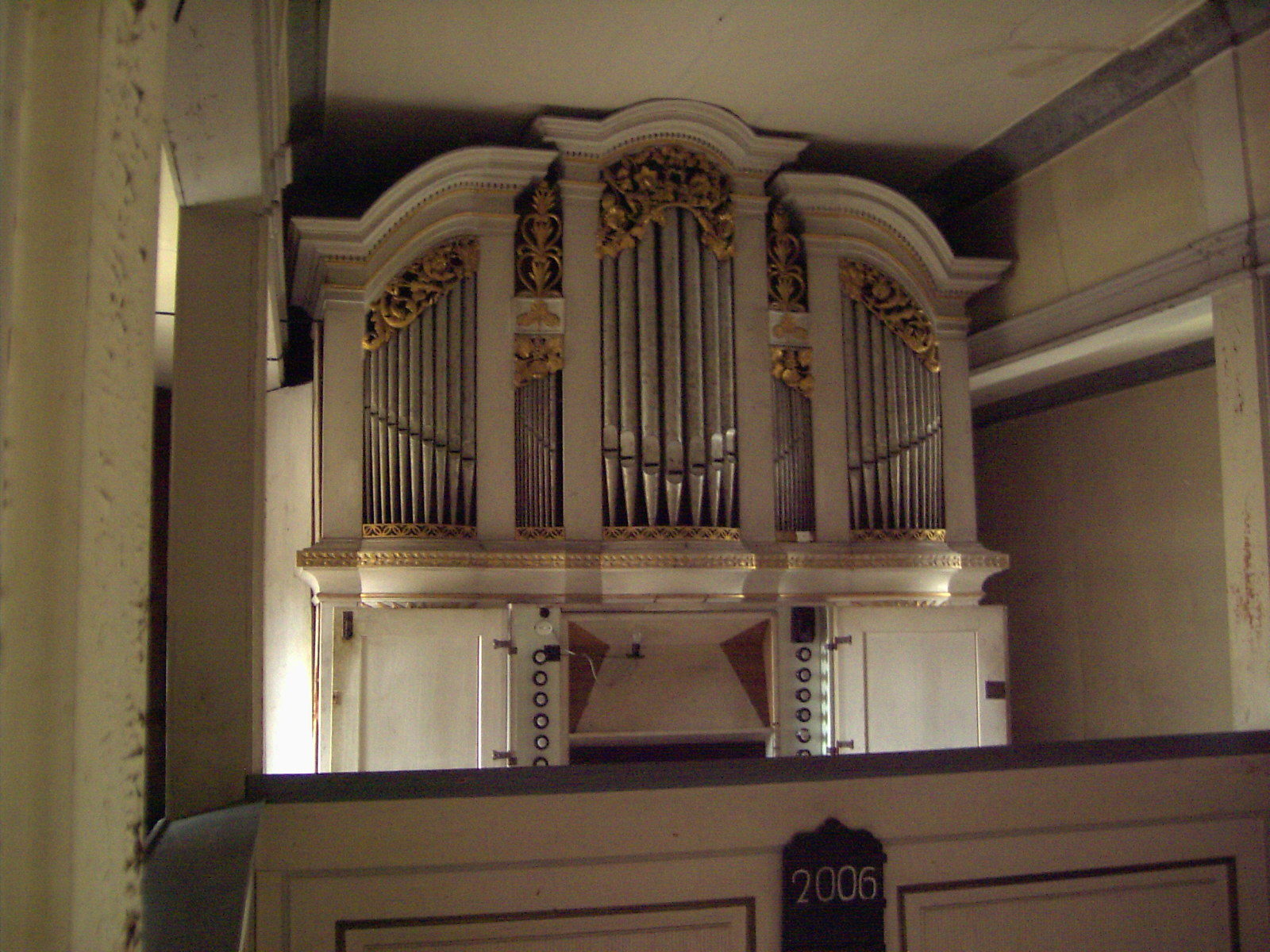 Rottdorf